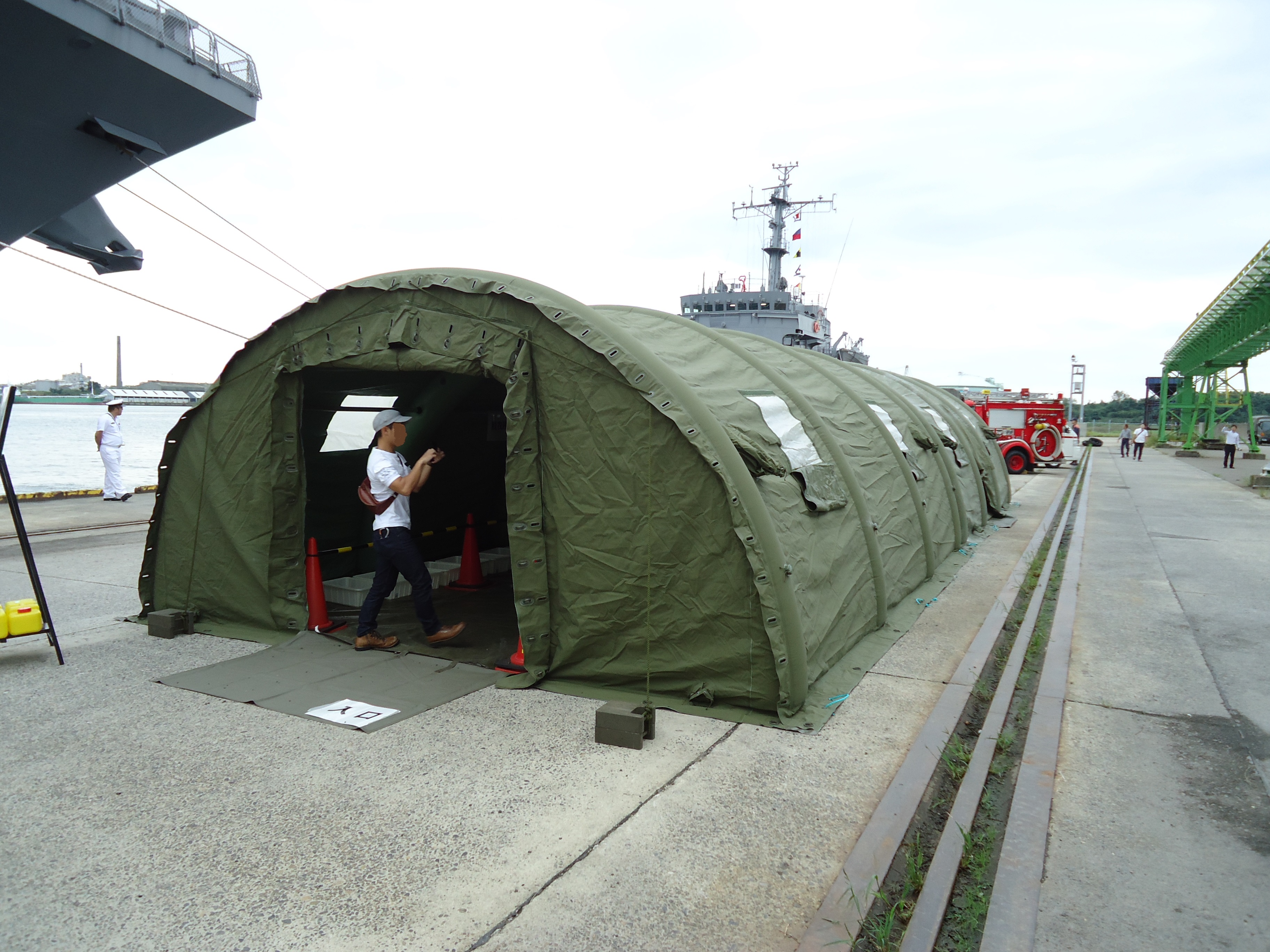 護衛艦ひゅうが一般公開に展示された第30普通科連隊の除染装置